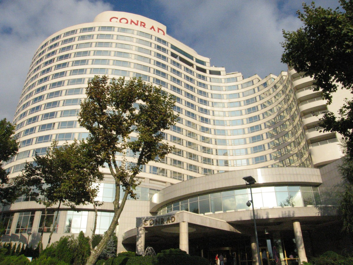 Conrad Hilton Hotel in Beşiktaş district of Istanbul, Turkey.